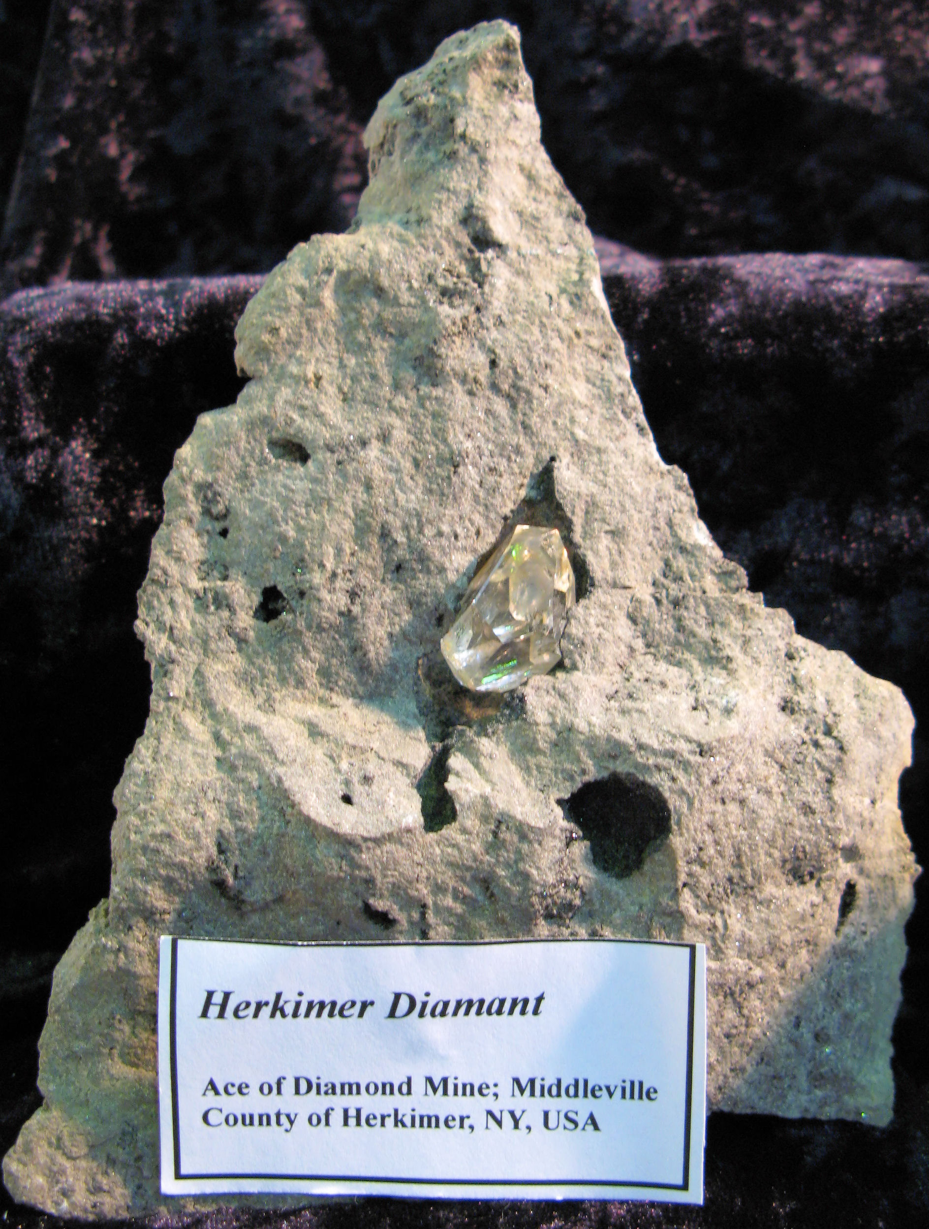 Herkimer Diamant - besonders reine Wuchsform eines Quarz-Kristalls